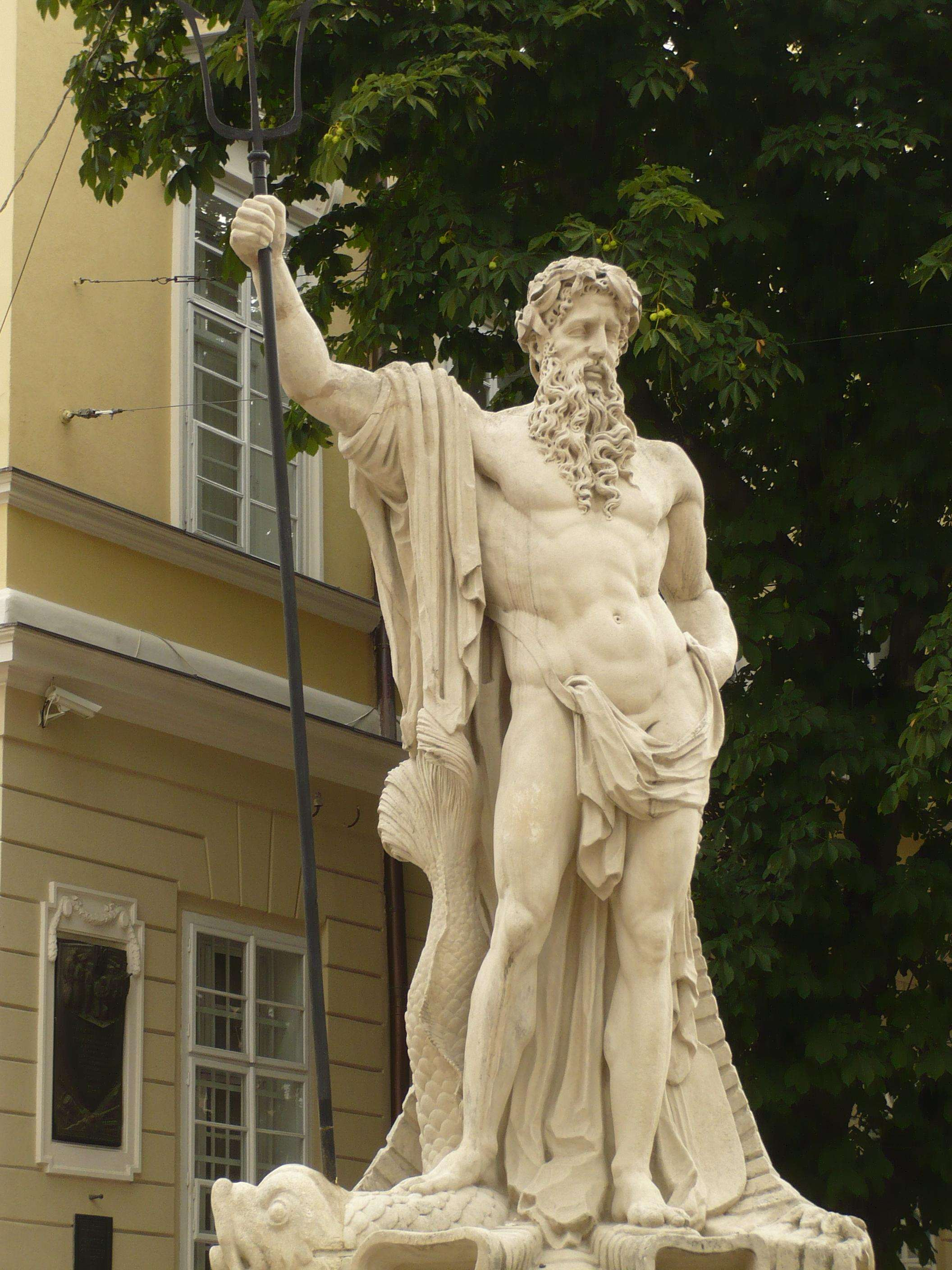 Rzeźba Neptuna w Rynku we Lwowie